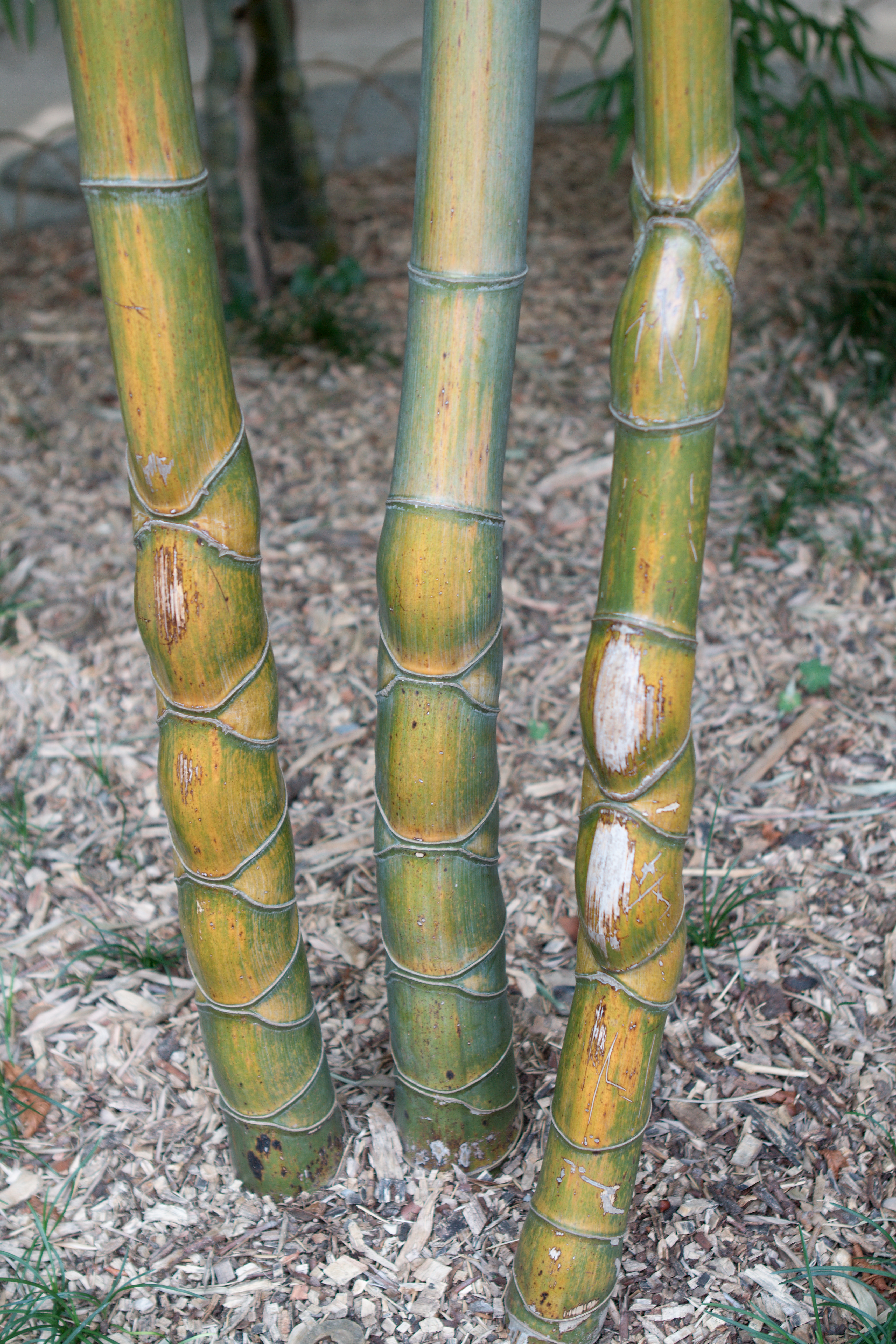 Phyllostachys edulis 'Kikko' à la bambouseraie de Prafrance (Gard, France).